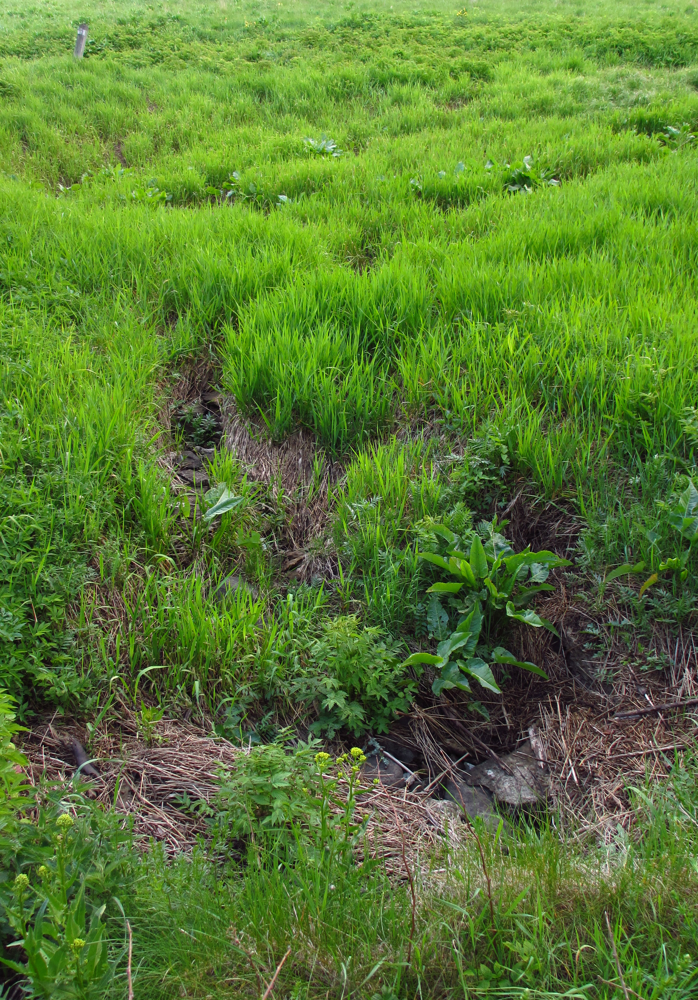 Kurisu Vasaristi karstialal